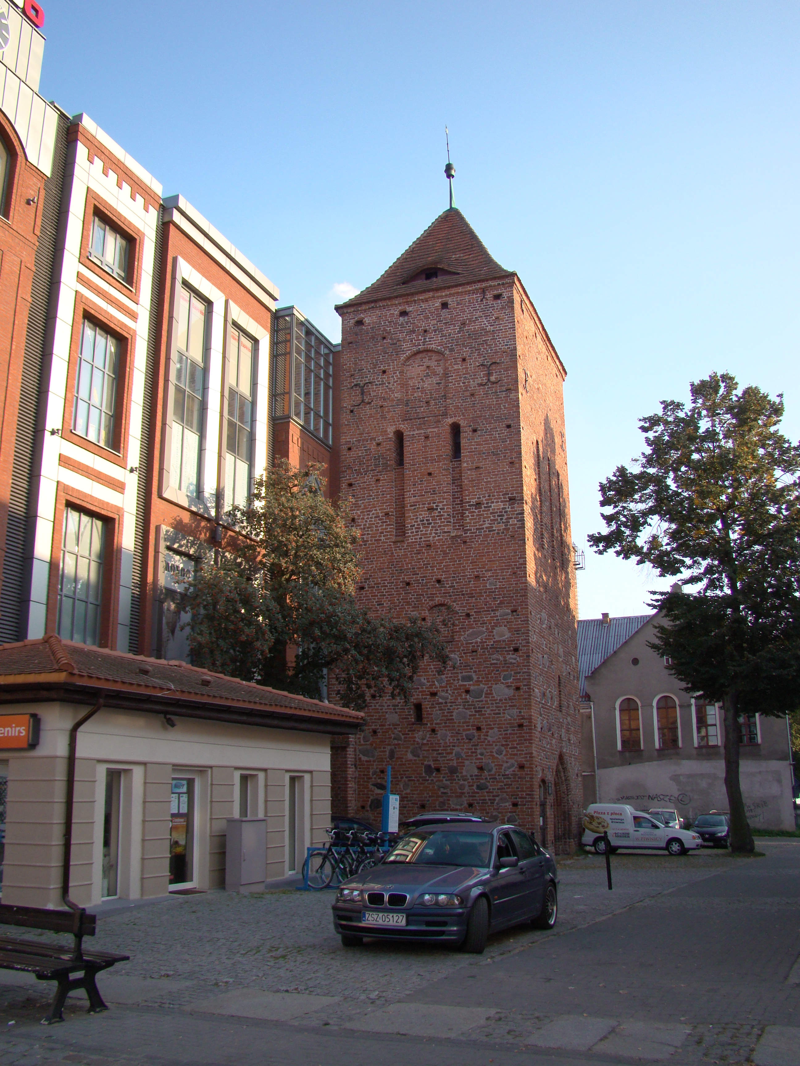 Szczecinek, ul. Ks. Elżbiety 6 - wieża kościoła p.w. św. Mikołaja, obecnie Muzeum Regionalne, XVI